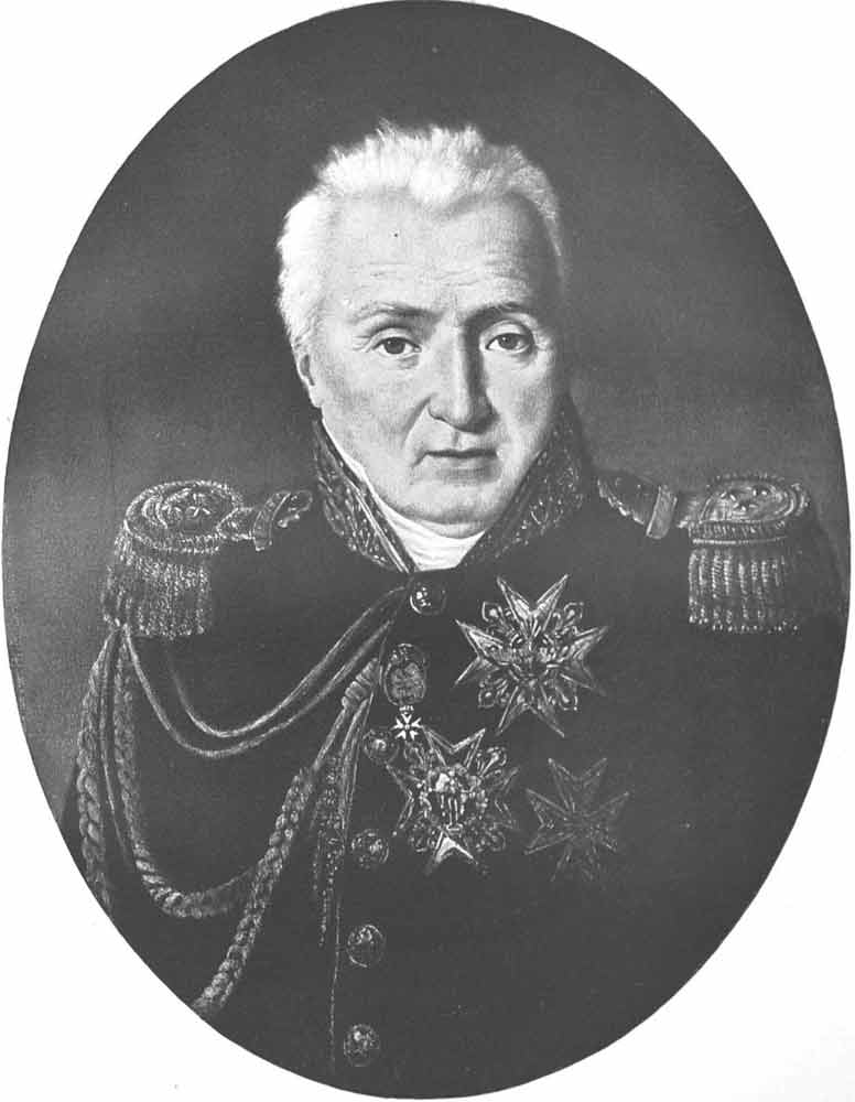 Генерал от кавалерии русской службы и генерал-лейтенант французской службы Жан Франк Луис Дотишамп во французском мундире.